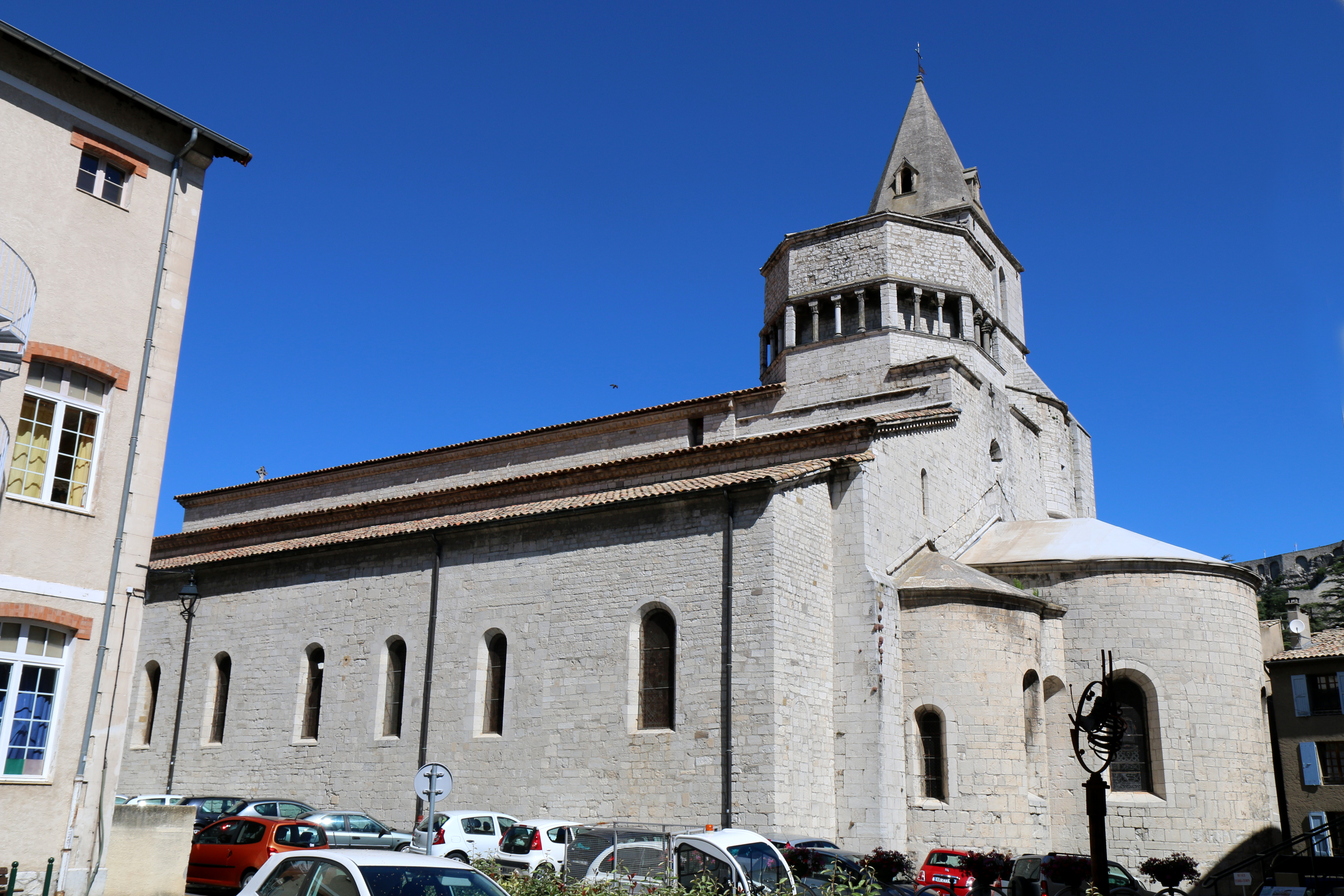 Façade sud de la cathédrale de Sisteron